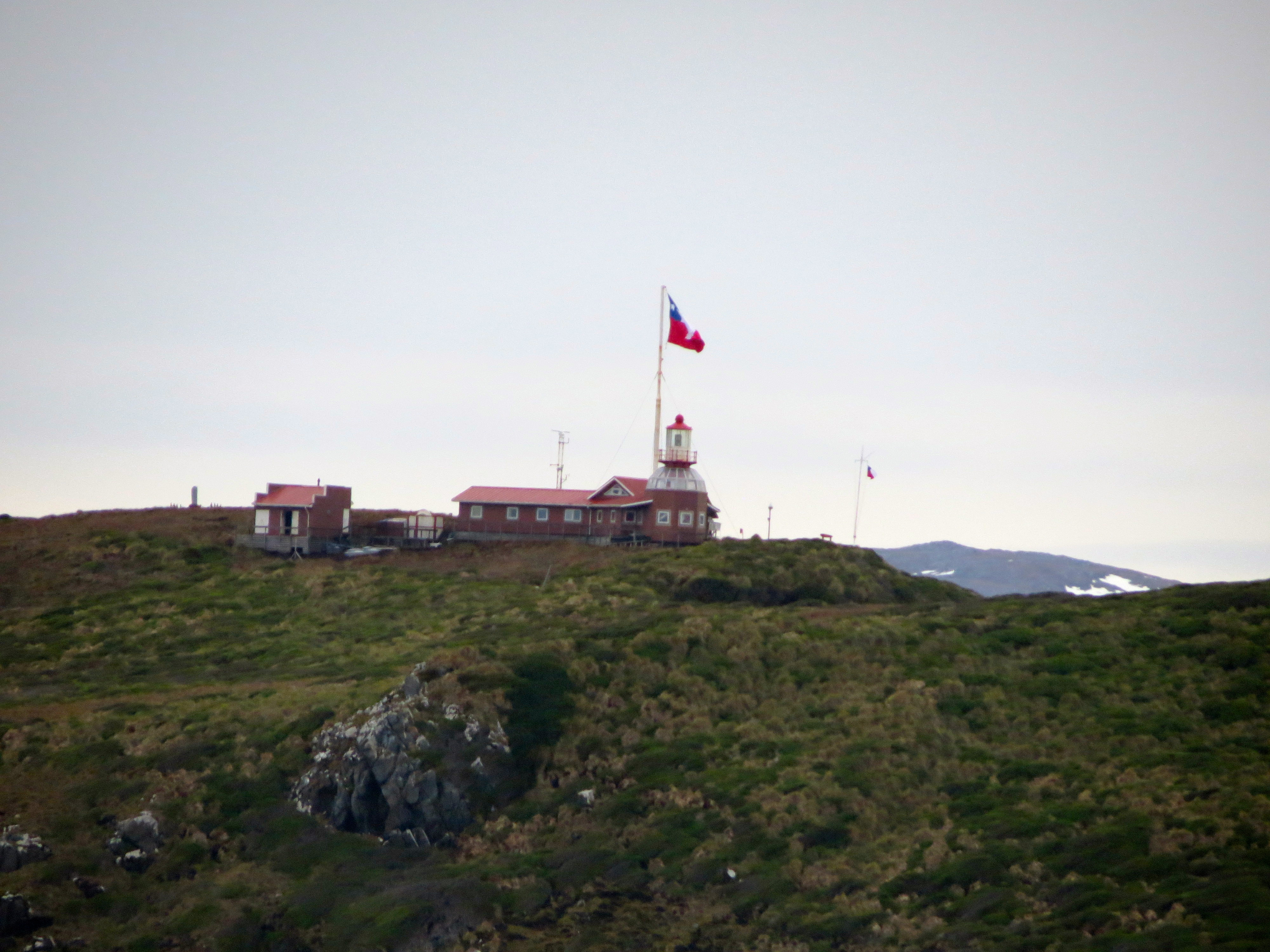 Toma Casa Naval y Faro en Cabo de Hornos This is a photo of a national monument in Chile: 2187